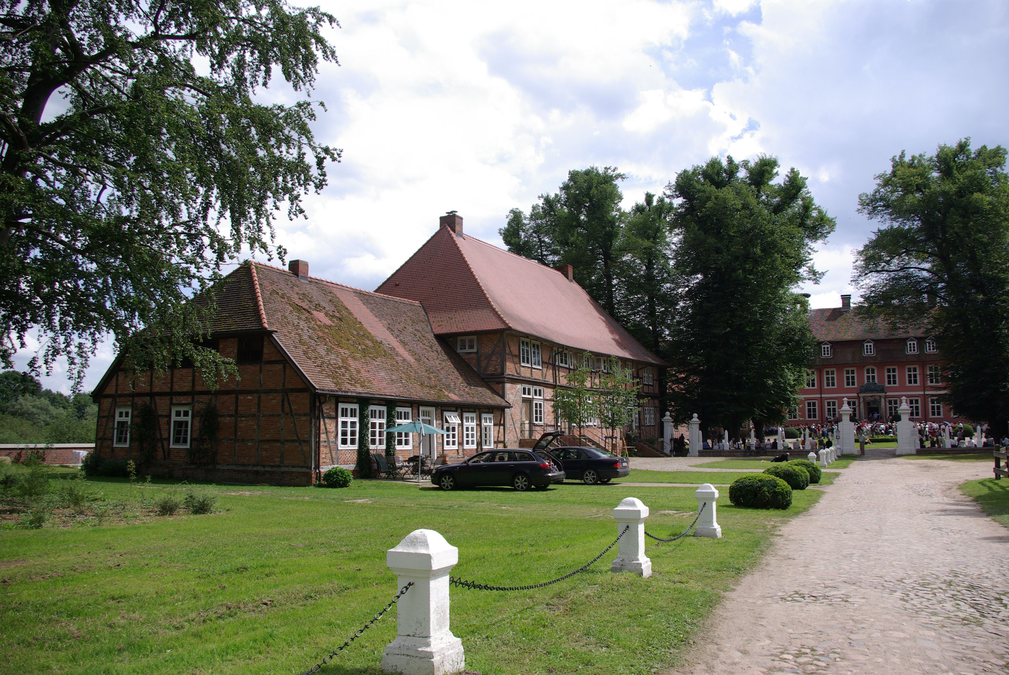 Gartow im Landkreis Lüchow-Dannenberg. Das Schloss Gartow mit den Nebengebäuden steht unter Denkmalschutz.